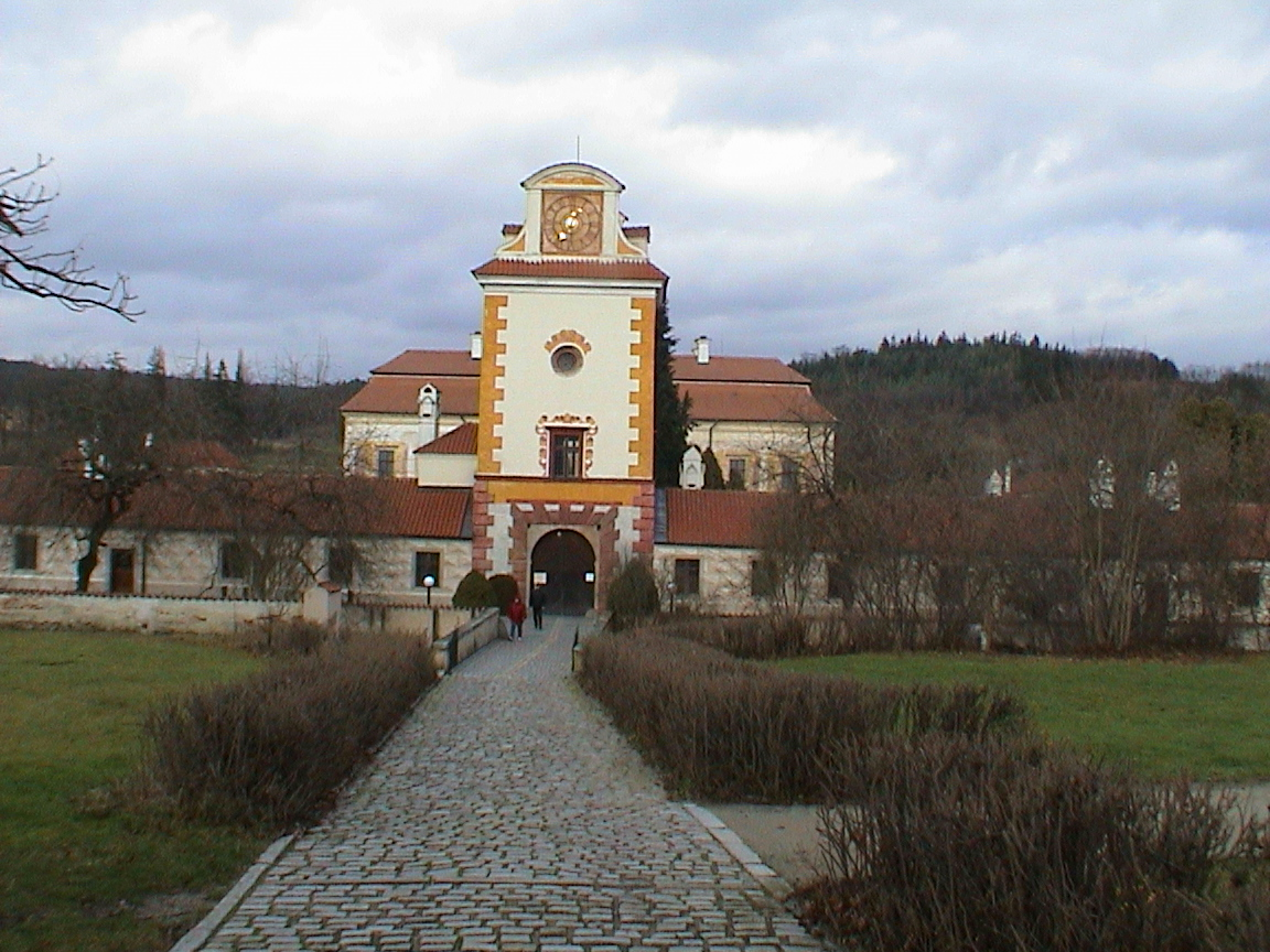 Zámek Kratochvíle